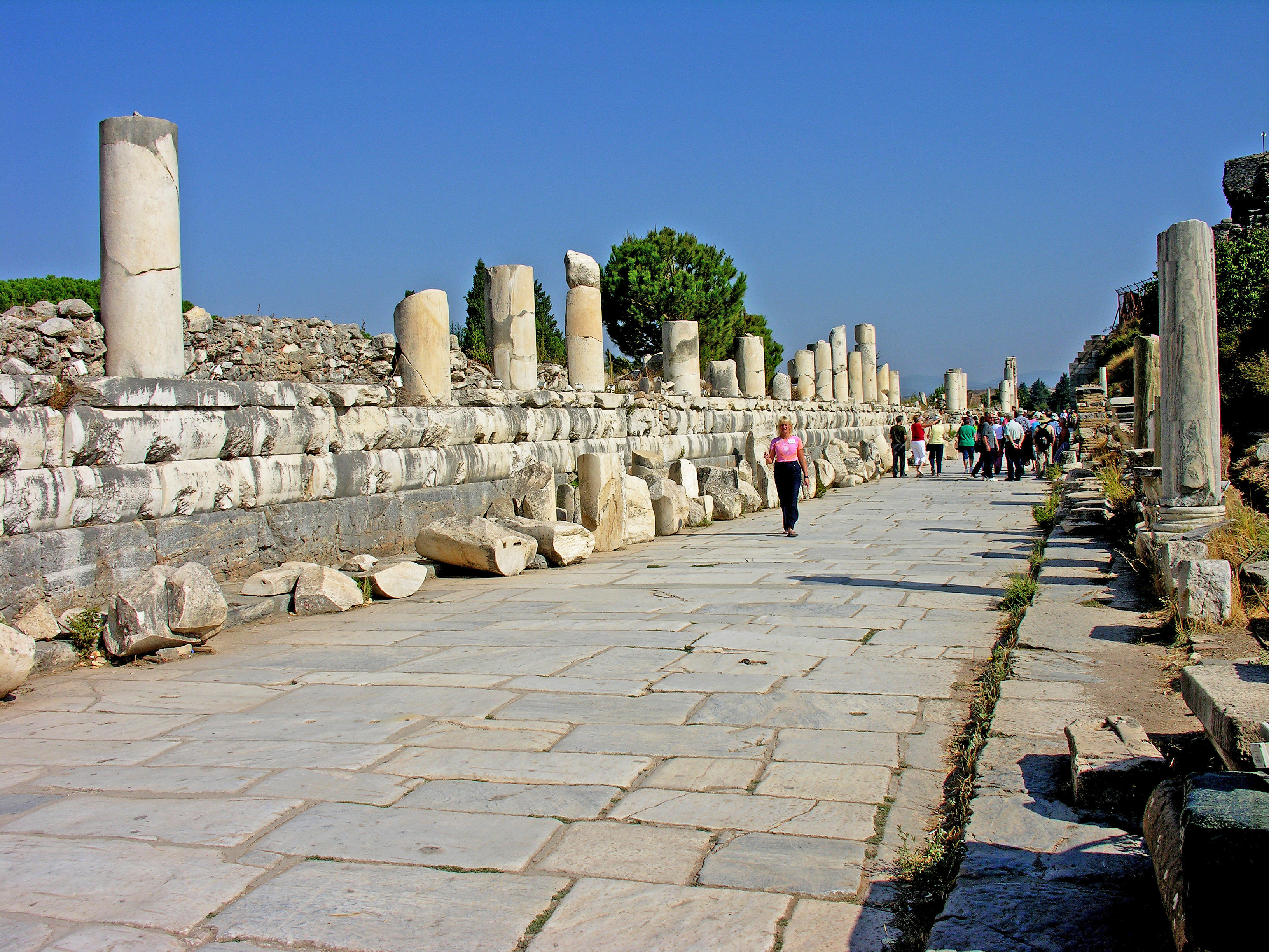 Turkey-2801